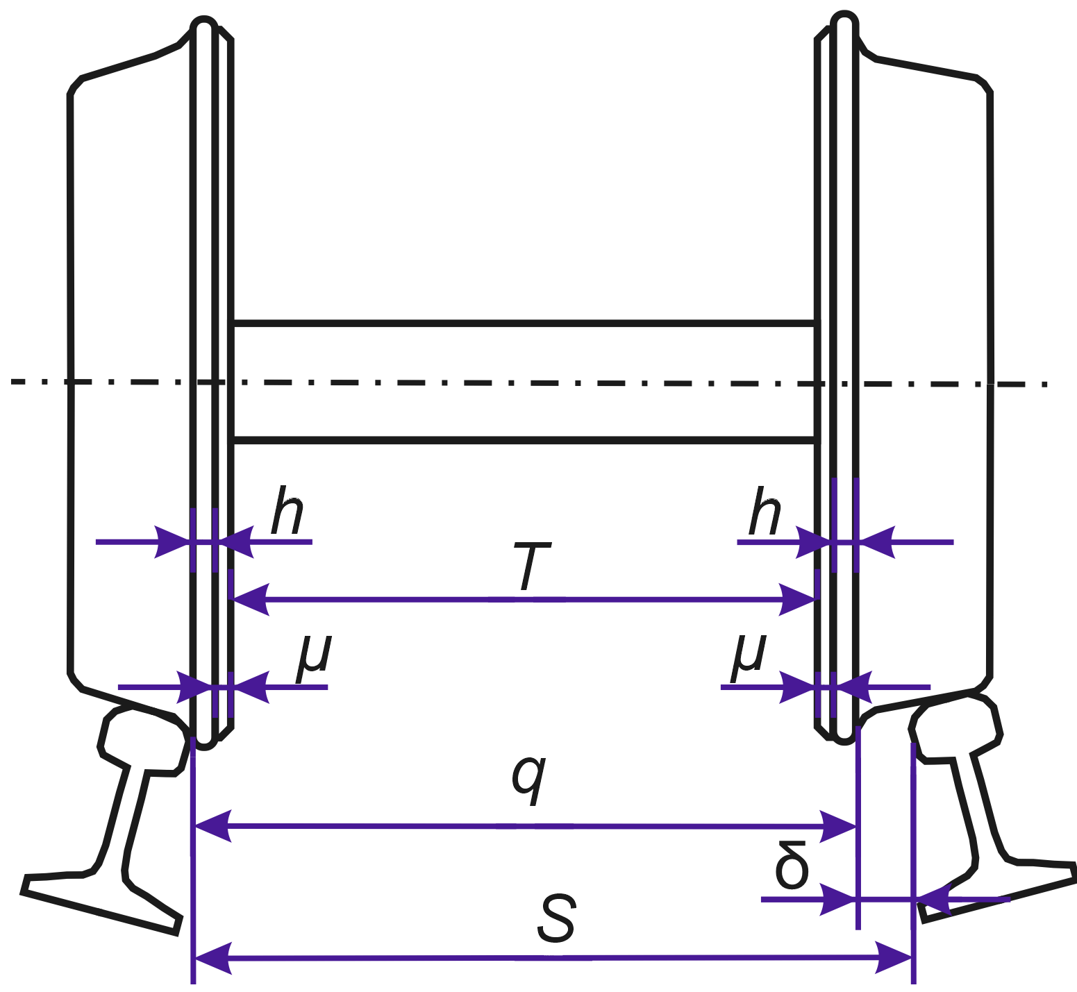 Riteņpāra stāvoklis taisnā ceļa posmā